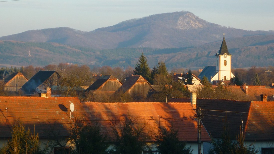 Nad Lovčou